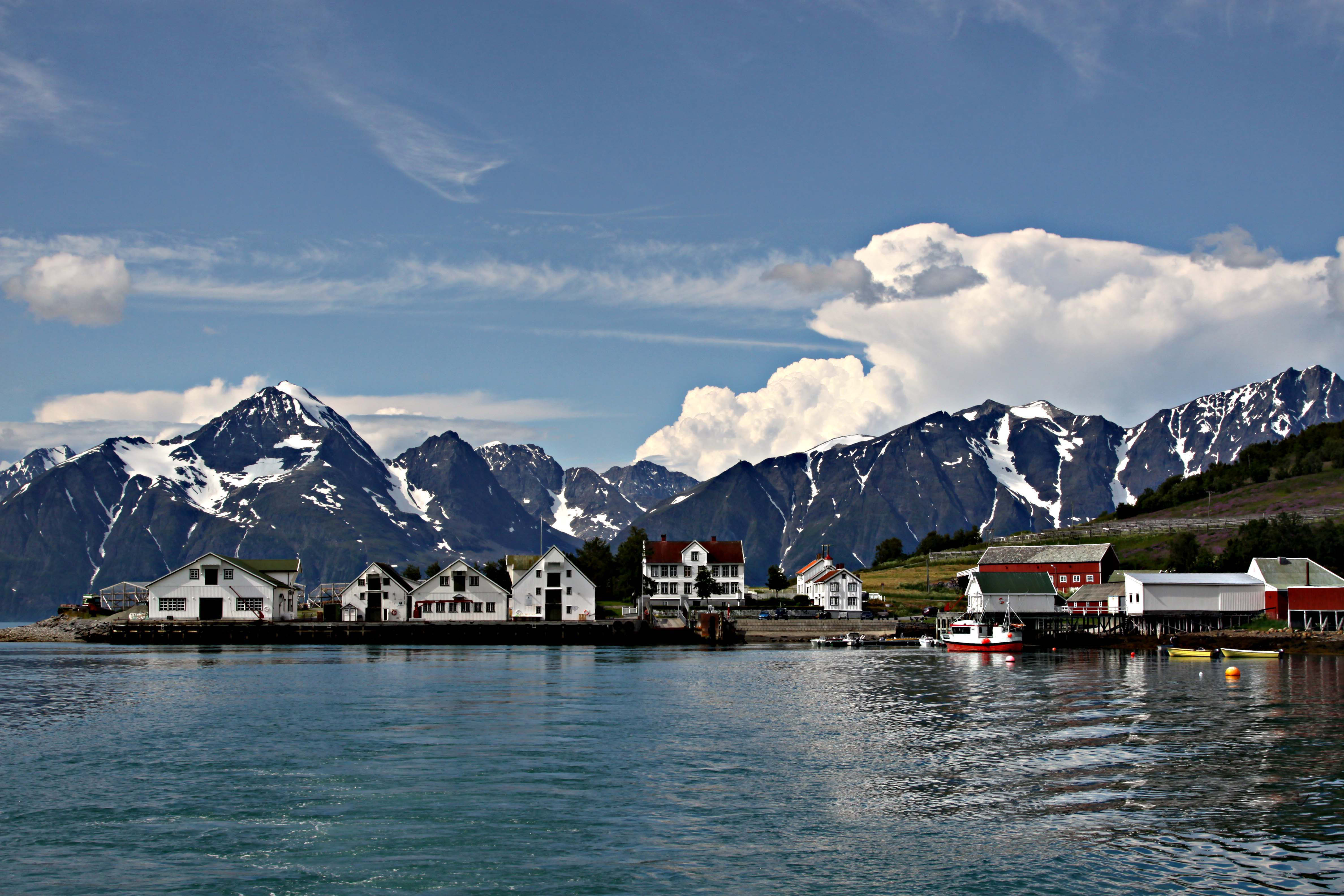 Norges nordligste bevarte handelssted som fortsatt er i drift!